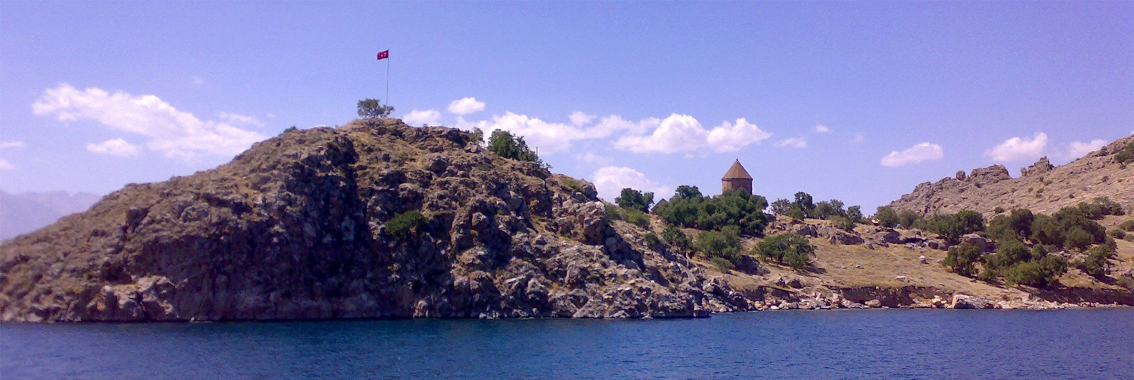 جزیره وکلیسای آک دامار دریاچه وان